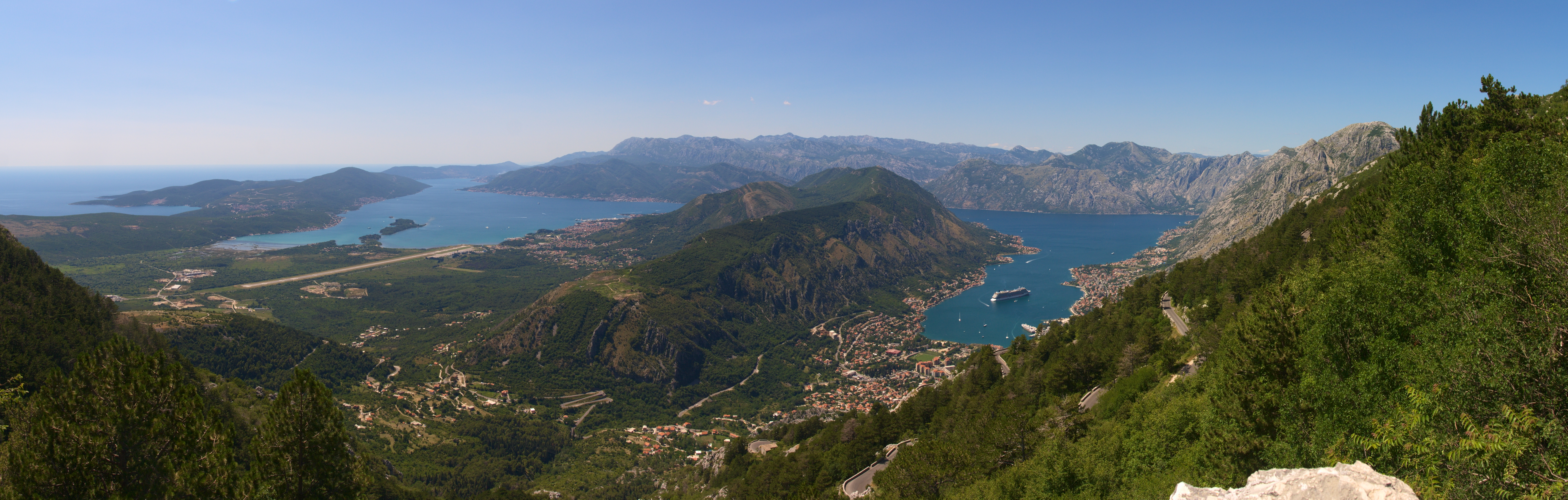 La bahía, que en ocasiones es llamada «el fiordo más meridional de Europa», es en realidad el cañón sumergido del desaparecido río Bokelj, que antiguamente corría desde lo alto de las mesetas montañosas del monte Orjen. NOTE: This image is a panorama consisting of multiple frames that were merged in software. As a result, this image necessarily underwent some form of digital manipulation. These manipulations may include blending, blurring, cloning, and color and perspective adjustments. As a result of these adjustments, the image content may be slightly different than reality at the points where multiple images were combined. This manipulation is often required due to lens, perspective, and parallax distortions.